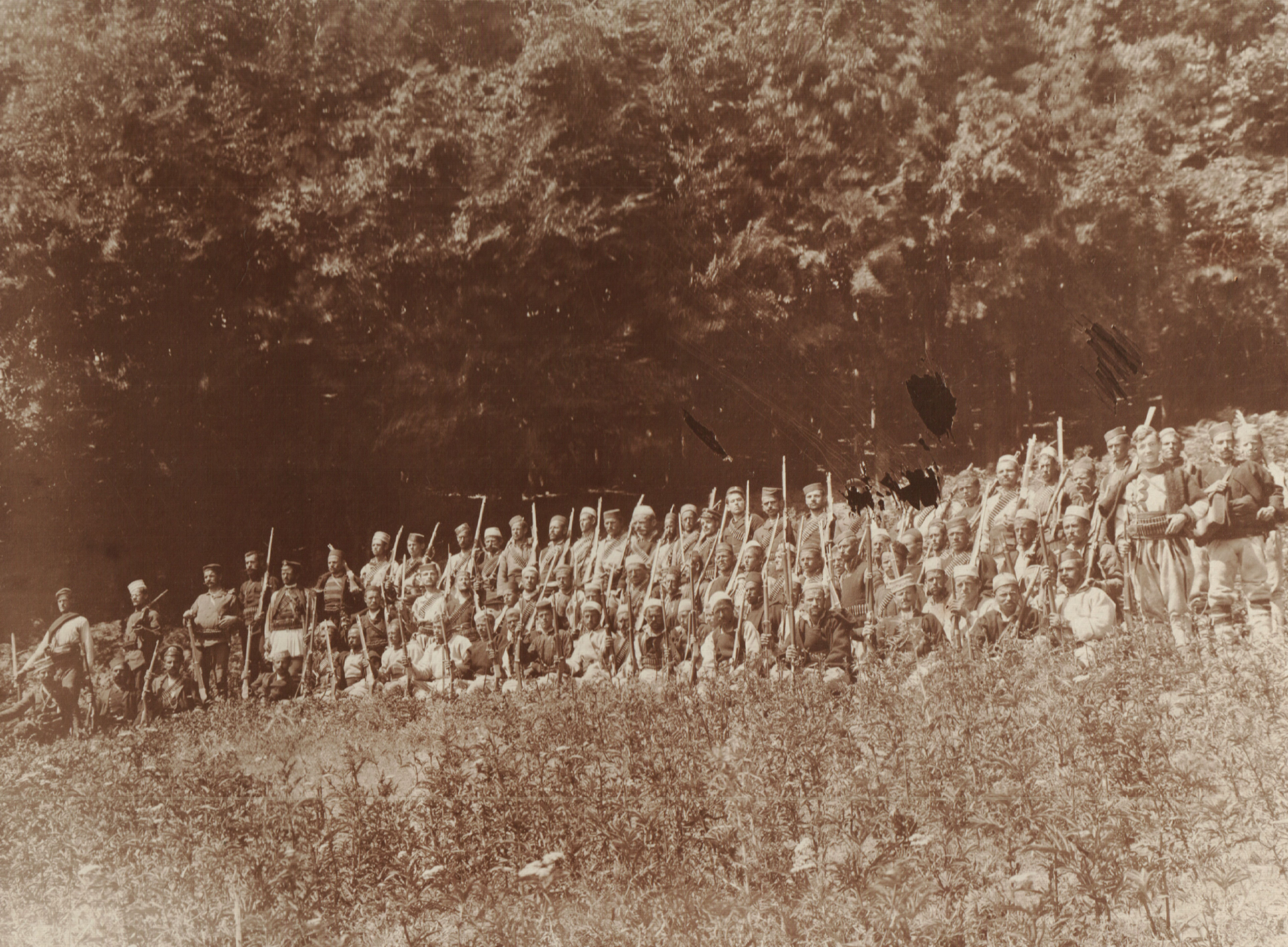 Снимка на четата на подпоручик Т. Христов. Въстанието в Крушово.